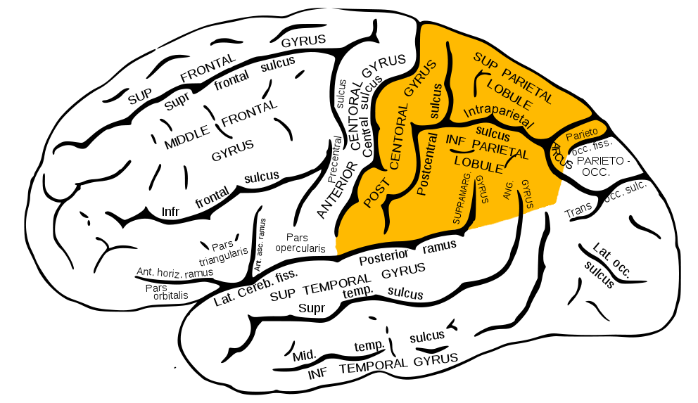 Parietal lobe.